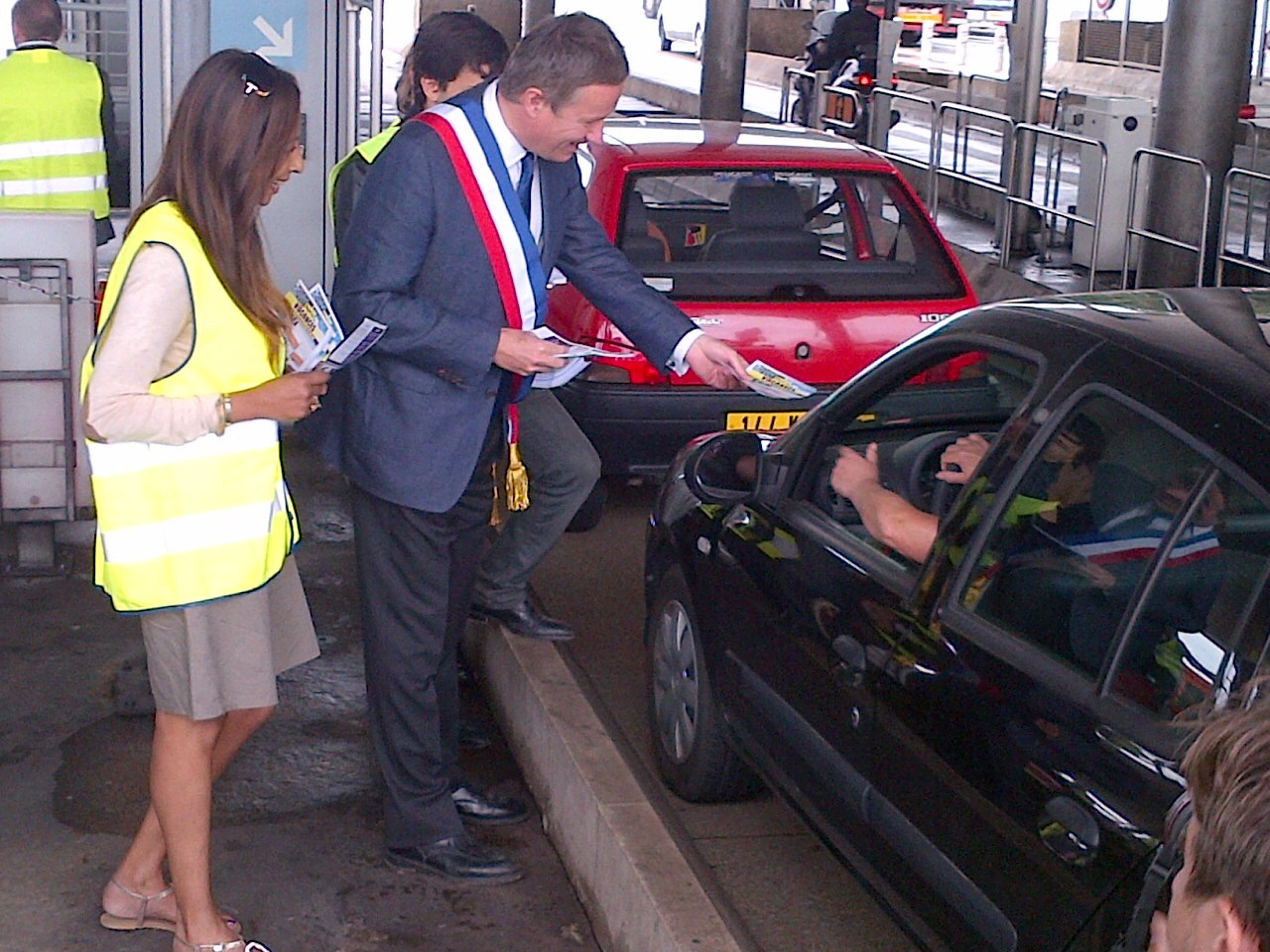 Nicolas Dupont-Aignan distribuant des tracts contre la privatisation des autoroutes et leur "racket" le 4 juillet 2013 dans les Yvelines